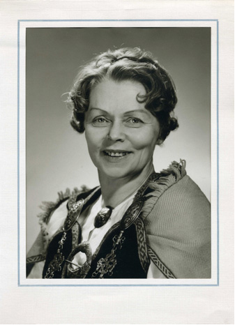 Kastehelmi Karjalainen